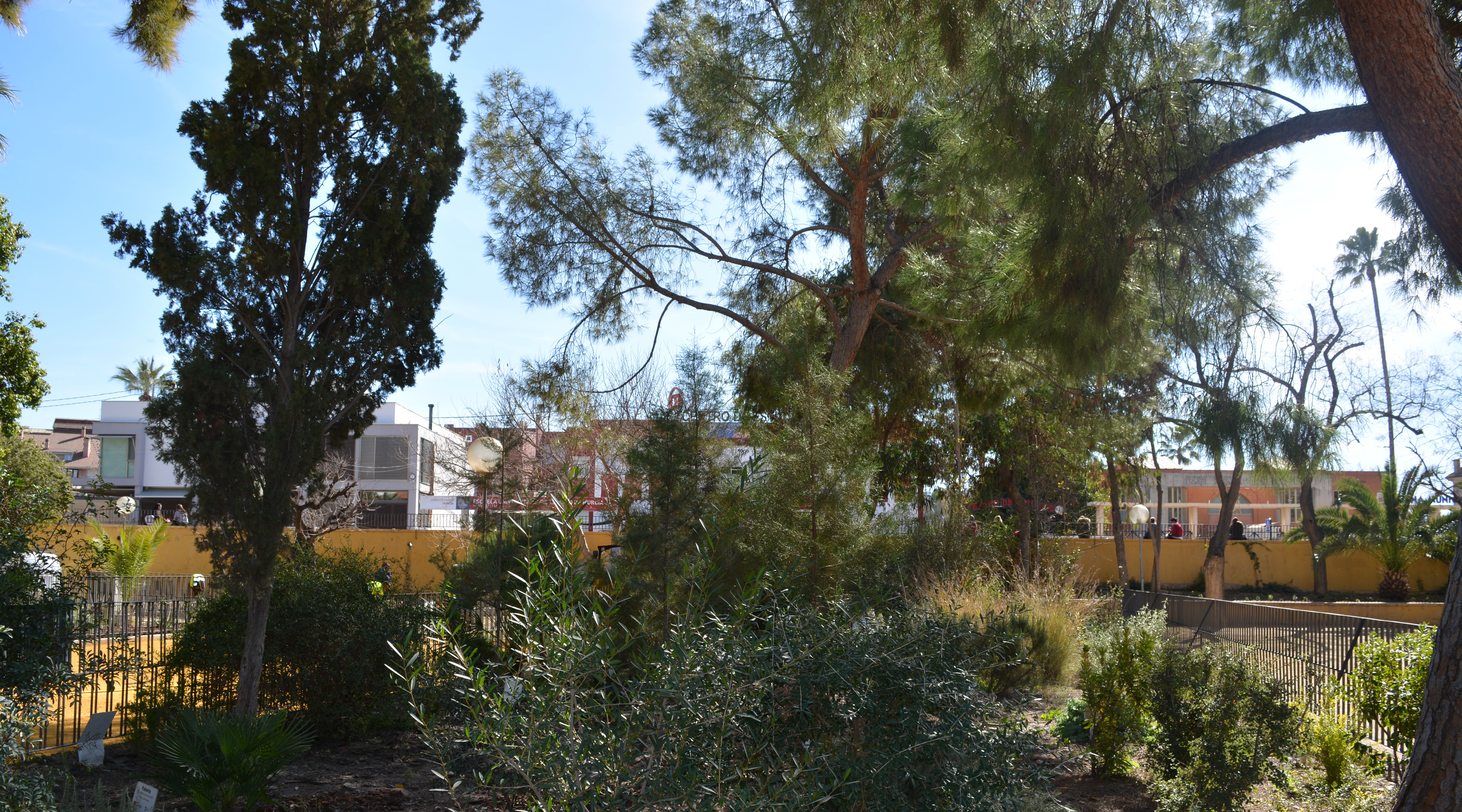 Parterre para la flora autóctona del Sureste ibérico.